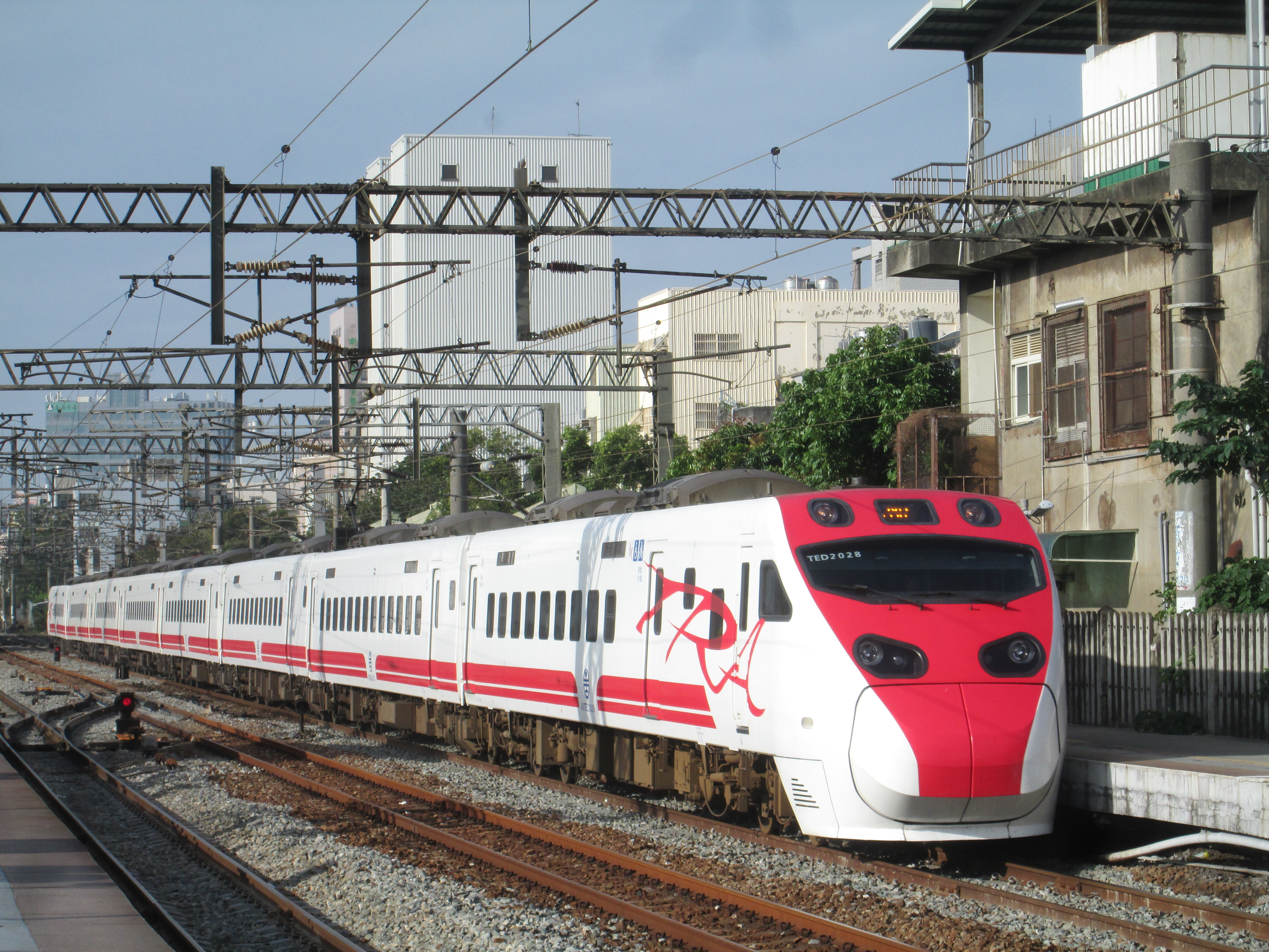 臺灣鐵路管理局電聯車TEMU2028在新竹車站，車頭編號TED2028。